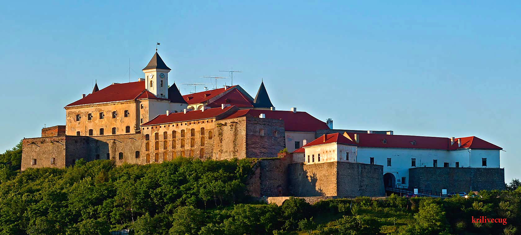 Мукачево. Замок Паланок